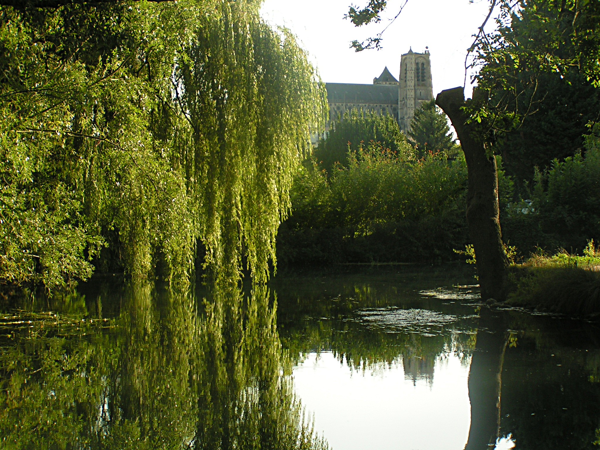 Description 18000 Bourges, Prise de vue, cathédrale Saint Étienne, depuis les Marais de Bourges. Date13 August 2009SourceOwn work by the original uploaderAuthorDomenico Di Nolfo 47.087397, 2.406515 18000 Bourges, Prise de vue, cathédrale Saint Étienne, depuis les Marais de Bourges.